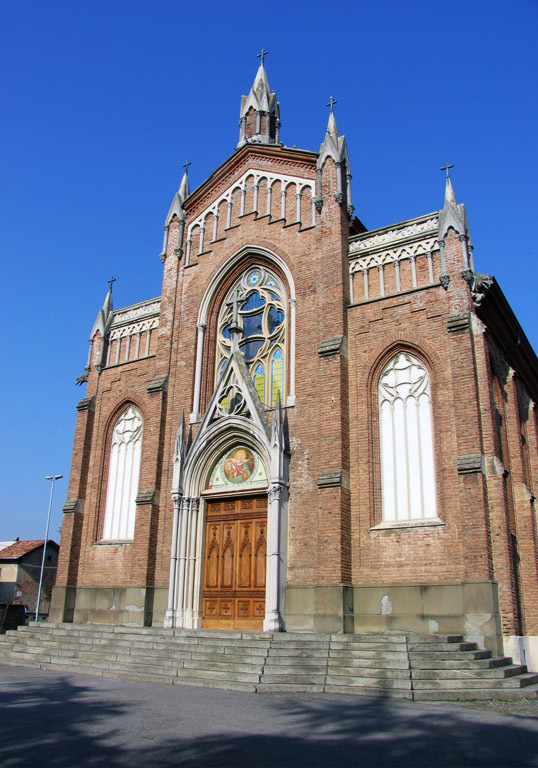 Chiesa di Trecella